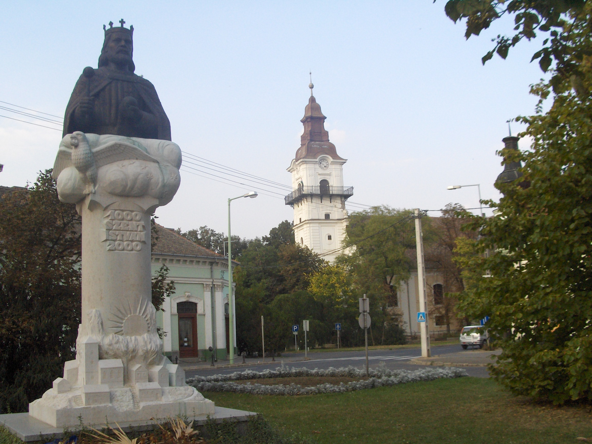 Szent István-szobor (Rajki László, 2000). Az oszlopfőn ábrázolt turulmadár az Árpád-ház totemisztikus ősét, az oroszlán pedig a királyi hatalmat szimbolizálja. Szent István jobbjában buzogányra emlékeztető jogart, baljában az országalmát tartja, fején abroncskoronát visel., háttérben az evangélikus templommal. Orosháza – Hungary